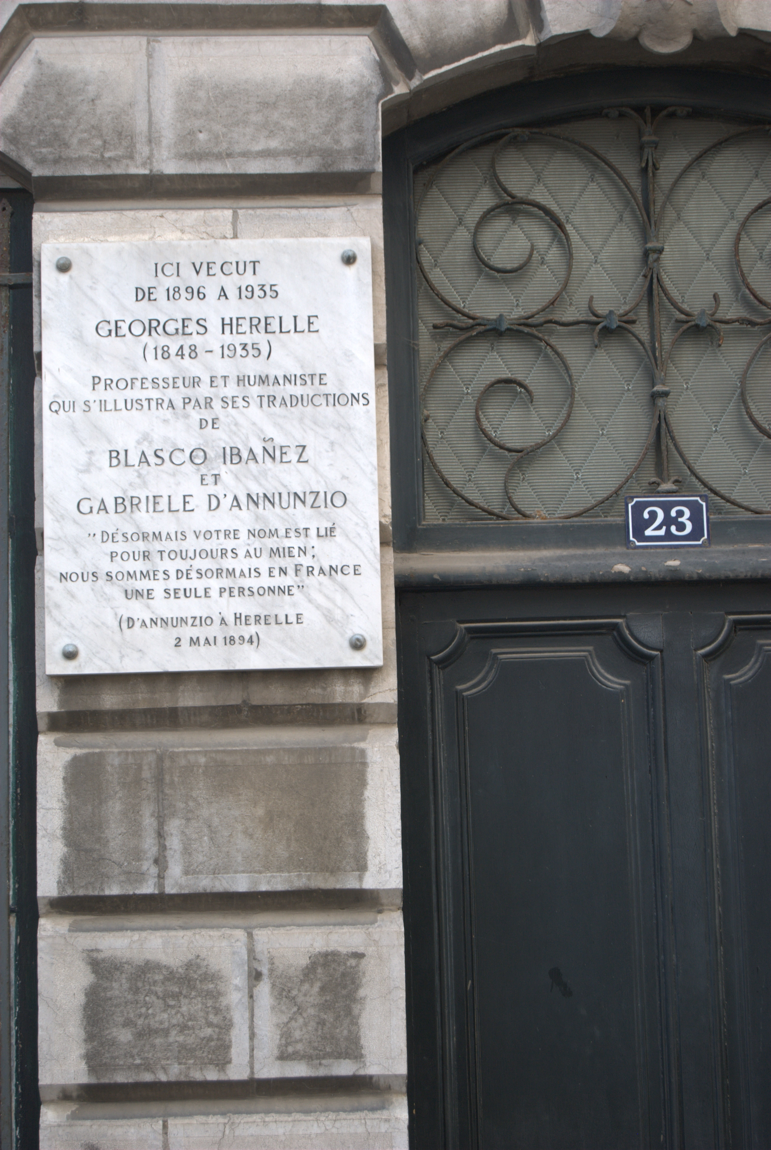 Plaque commémorative au 23, rue Vieille-Boucherie où résida Georges Hérelle.